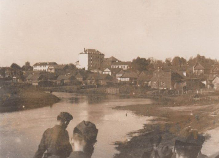 Беларуская (тарашкевіца): Менск (Miensk), рака Сьвіслач (Śvisłač) і Пярэспа (Piarespa)